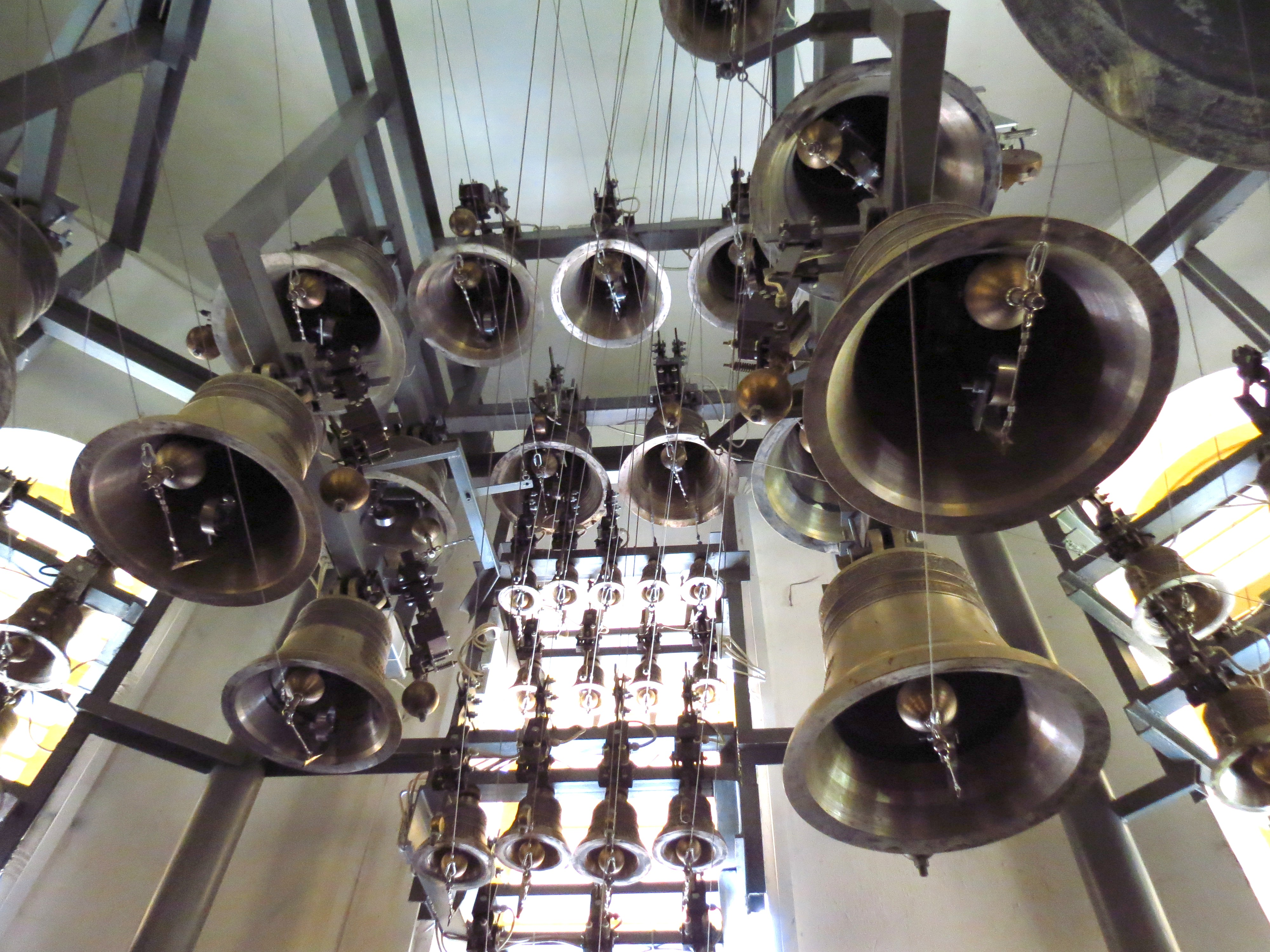 Механізм карильону Гошівського монастиря (греко-католицькому монастирі Чину св. Василія Великого у селі Гошеві Долинського району Івано-Франківської області). Гошівський карильйон – це другий карильйон в Україні. Станом на травень 2015 року Гошівський карильйон складається з 52 дзвонів, на яких можна виконати церковні мелодії чи твори класичної музики. Карильйоном може керувати як людина (для цього він обладнаний спеціальною клавіатурою), так і комп'ютер. Тому місцеві жителі інколи назвають цей карильйон "електронними дзвонами". Дзвони для цього карильйону відливали у Бельгії на пожертви приватних осіб. Їх імена викарбувані на дзвонах. Перший ювілейний дзвін було встановлено та освячено 5 серпня 2012 року з нагоди 275-ї річниці перенесення чудотворної ікони Гошівської Матері Божої до монастиря.